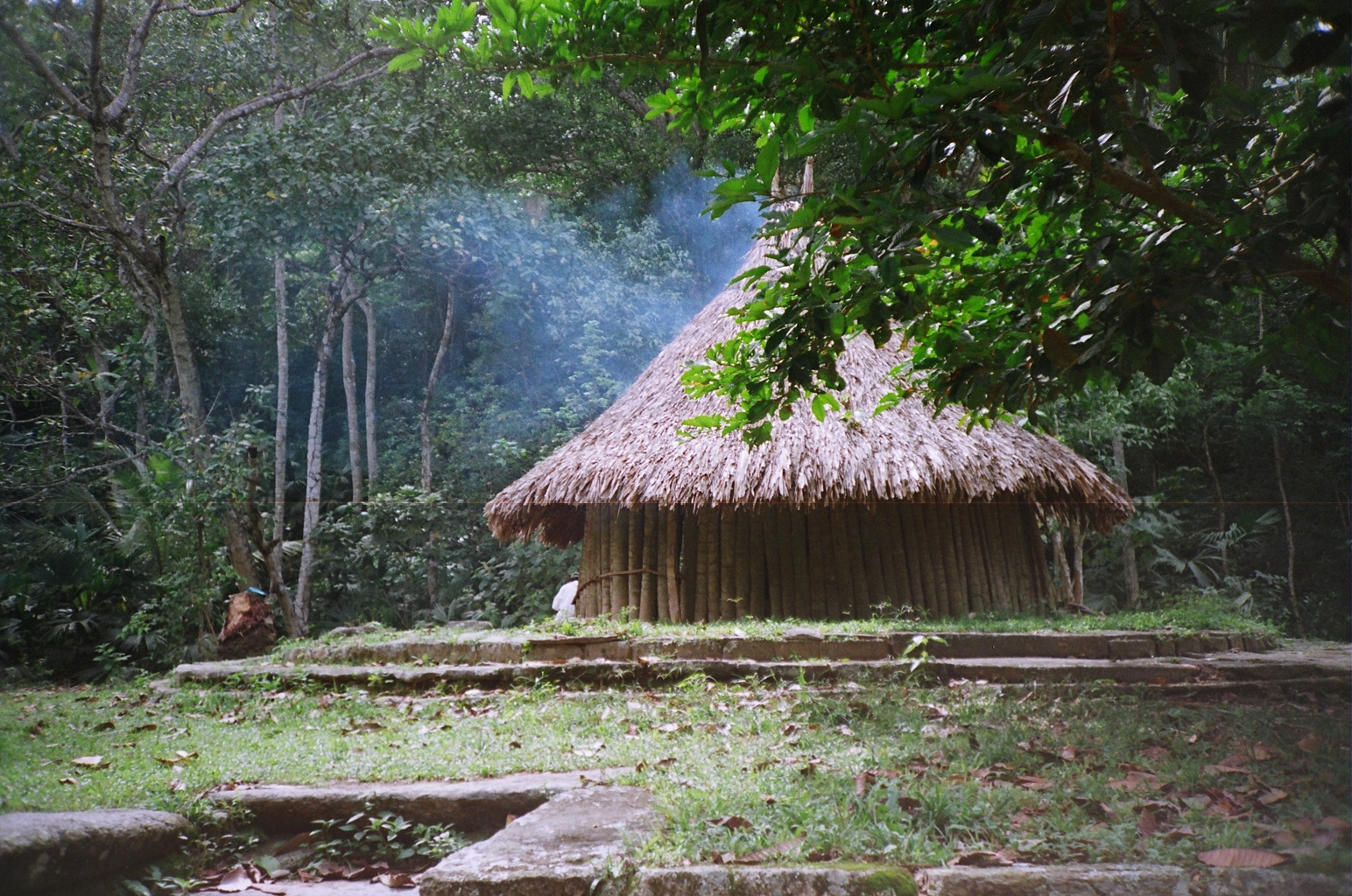 Tayrona 01-2011